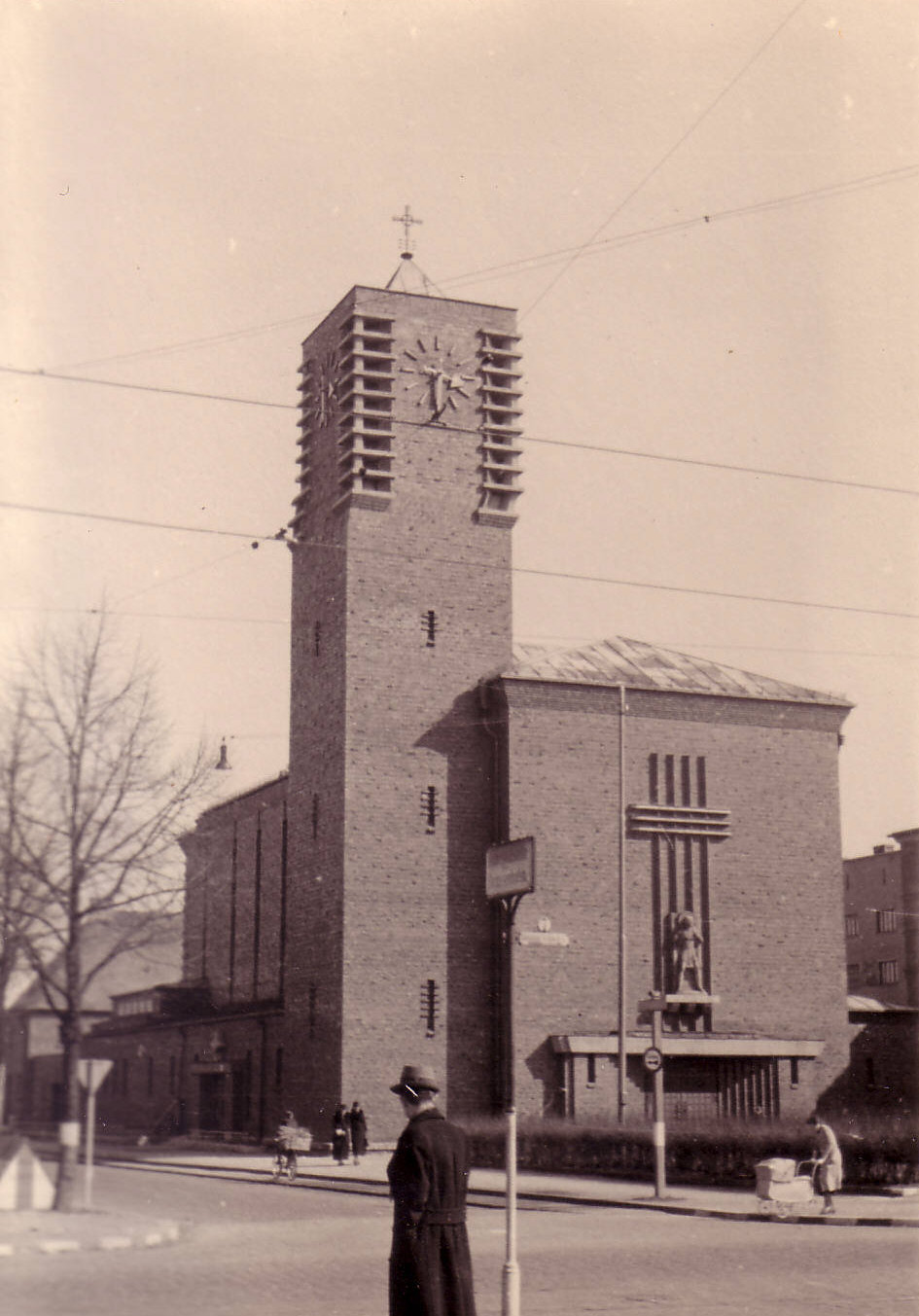 St. Sebastian, 1929, Munich, Germany